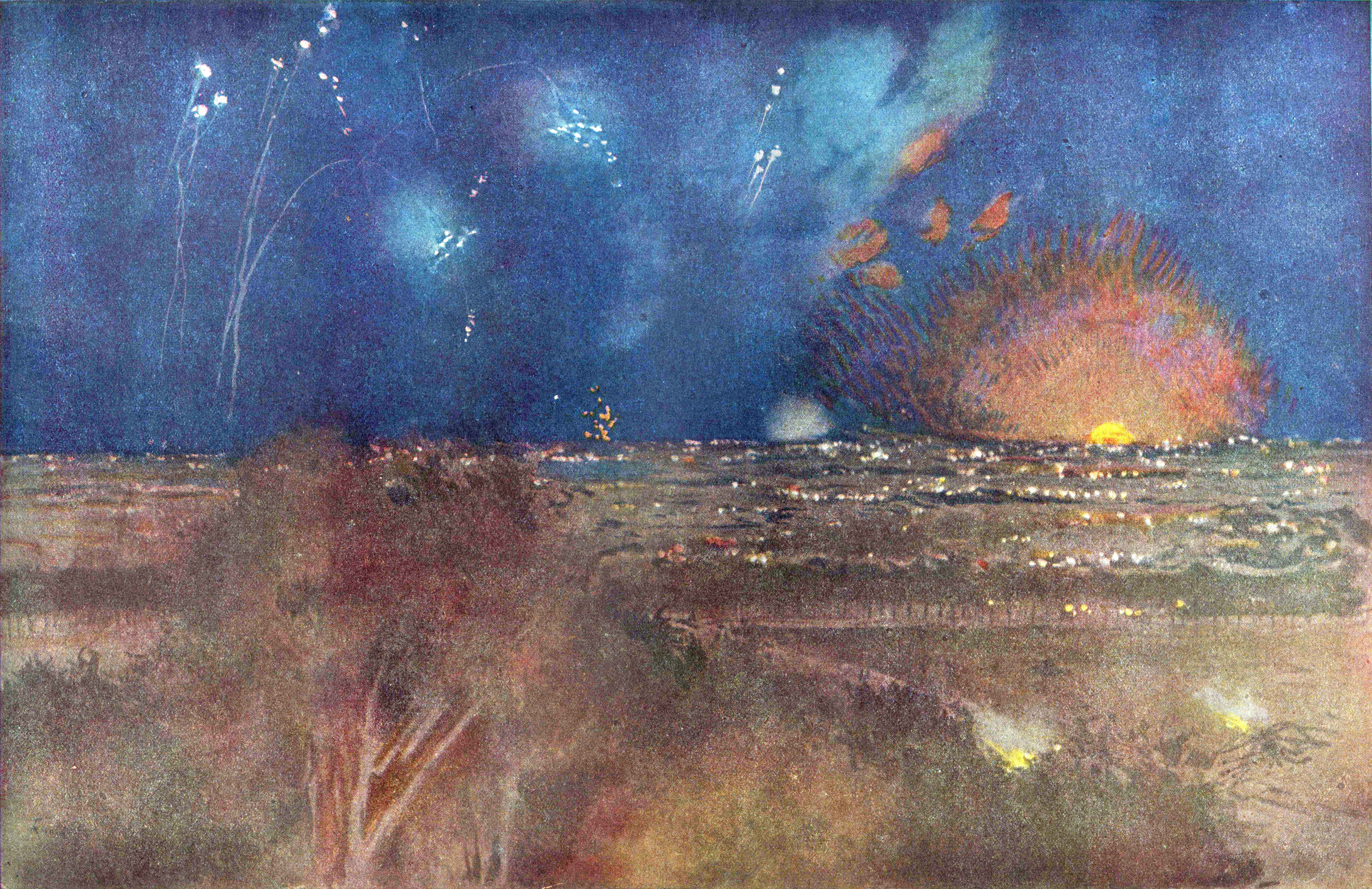 Scan of L'ILLUSTRATION No3910 9 Février 1918 L'ILLUSTRATION No3910 page 136, L'offensive de l'Yser, Bombardement des lignes allemandes par François Flameng.